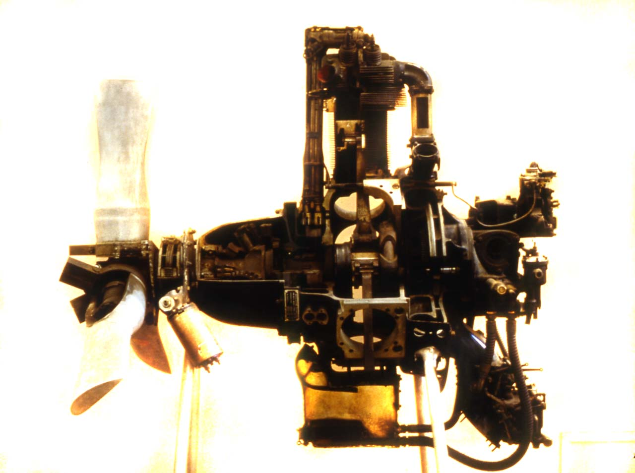 Motore a 9 cilindri disposti a stella, raffreddato ad aria. Il motore è stato sezionato a scopi dimostrativi e presenta un solo cilindro impiantato sul carter. Il cilindro, ampiamente alettato, presenta un sistema di distribuzione costituito da quattro valvole in testa, regolate da aste e bilancieri. Il sistema di alimentazione è costituito da un carburatore aspirato e da un compressore centrifugo monostadio ad una velocità, posizionato sul retro del motore ed anch'esso sezionato. L'accensione del carburante è determinata da due candele per cilindro, alimentate da due magneti. Il motore è dotato di riduttore epicloidale, posizionato tra l'albero a gomito e l'albero dell'elica, costituito da ingranaggi conici con rapporto di riduzione 1:0,655. Nella parte inferiore del carter è sistemata la coppa dell'olio, anch'essa sezionata. Anteriormente, un'elica a tre pale sezionate è calettata sull'albero dell'elica. Notizie storico-critiche A partire dal 1933, dopo la decisione dell'Aeronautica Militare italiana di concentrasi unicamente su propulsori raffreddati ad aria, le varie case costruttrici italiane produssero vari modelli di motori a stella raffreddati ad aria, derivati da licenze straniere. Nonostante venissero applicati molti sviluppi originali, i motori italiani durante gli anni '30 non apportarono particolari innovazioni al mondo dell'aviazione. In particolare, il motore Alfa 126 RC 34 rappresenta le versione italiana del Pegasus della Bristol Aeroplane Co. progettato da Roy Fedden, prodotta su licenza dal 1935. Montato su diversi velivoli, questo motore raggiunse ottimi risultati sportivi stabilendo, nel 1937, il primato di distanza per idrovolanti su un Cant Z.506B e vincendo, lo stesso anno, la gara Istres-Damasco-Parigi su un SIAI S.70; nel 1938 motorizzò tre Savoia Marchetti SM.79 nella trasvolata Roma-Dakar-Rio de Janeiro. Questo motore, inoltre, fu uno dei più diffusi propulsori adoperati dall'Italia durante la Seconda Guerra mondiale.